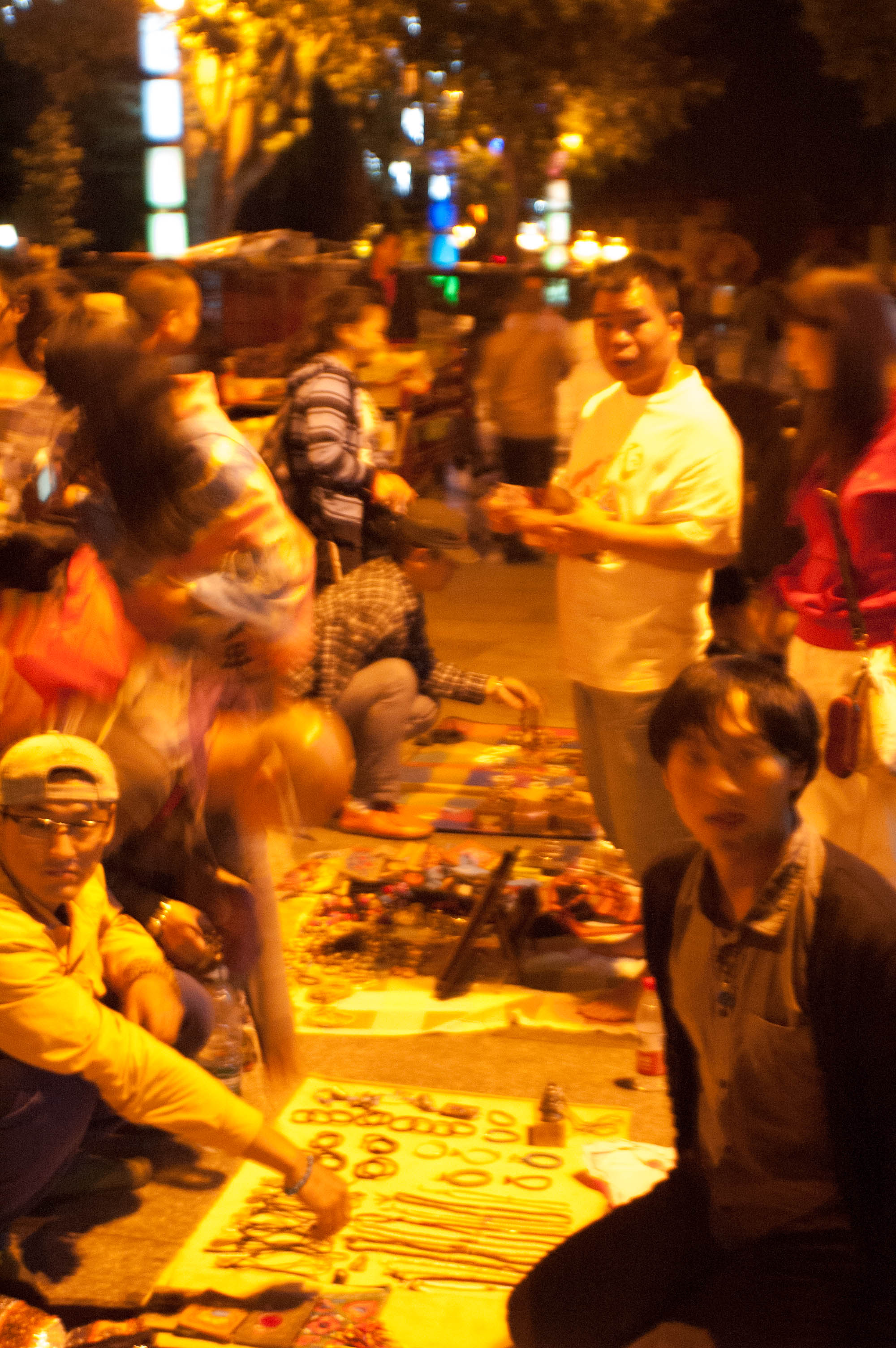 201308宇拓路夜市